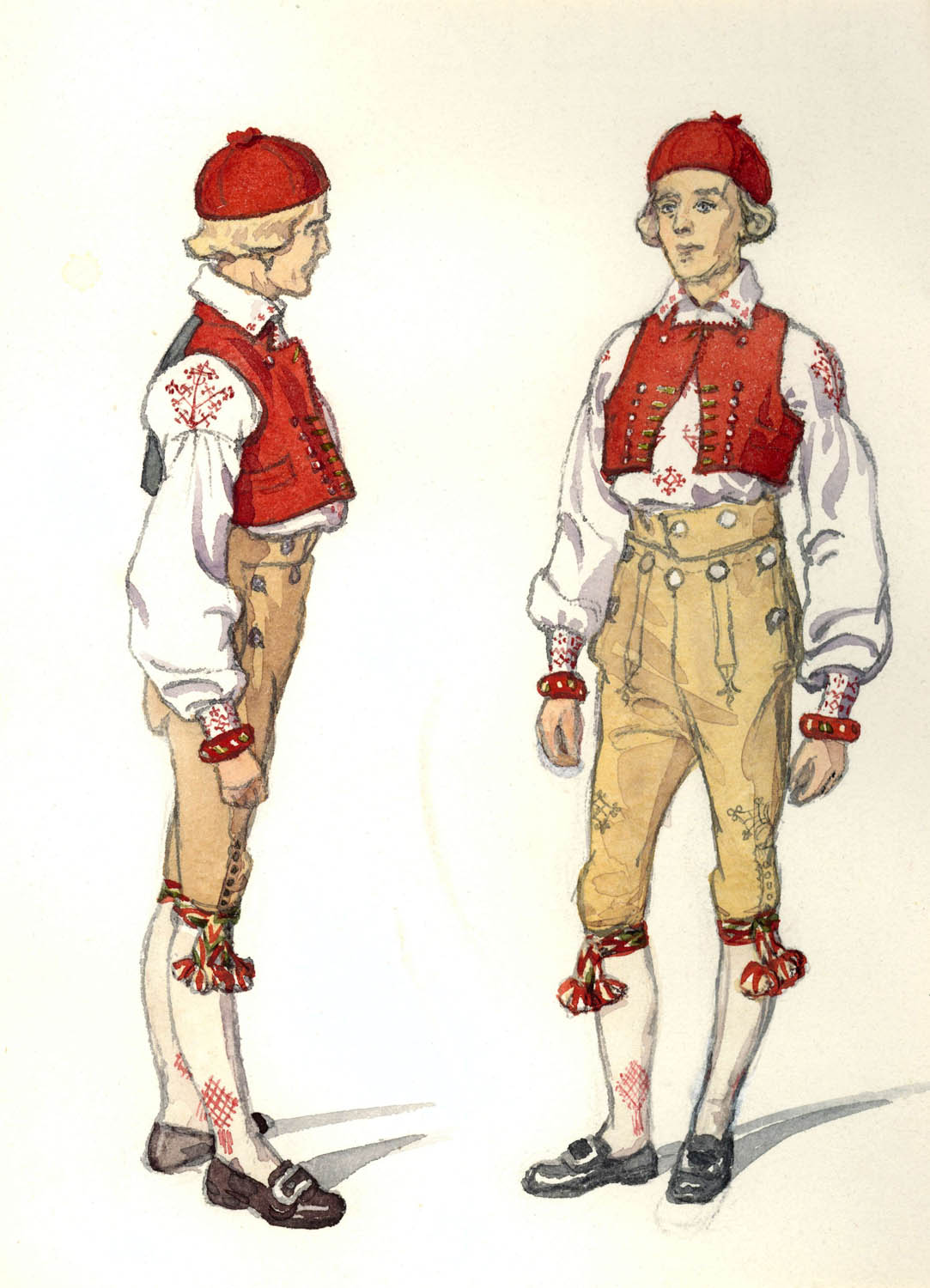 Folkdräkt, söndagseftermiddagsdräkt, Ny socken, Värmland. Mansdräkt. Akvarell av Emelie von Walterstorff.